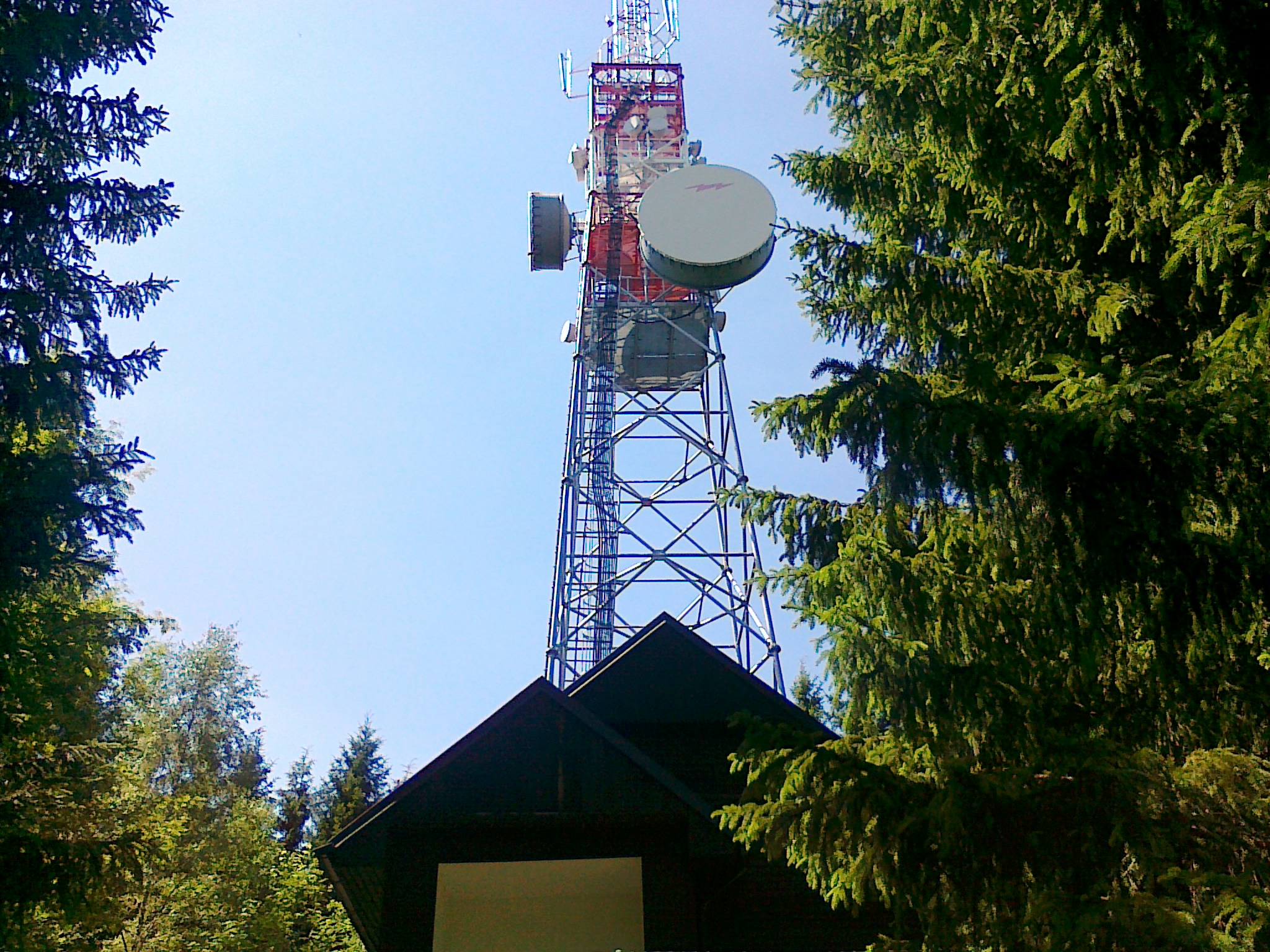 Przekażnik radiowy na szczycie góry Anenský vrch